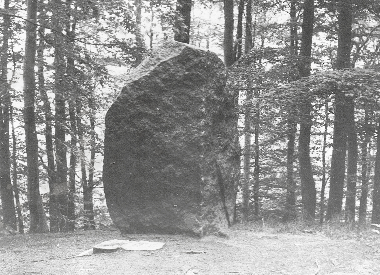 Der „Jahnstein“ auf den Höhen des Brodaer Holzes im Stadtwald Neubrandenburg.